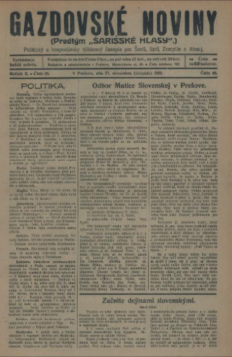 Titulný list týždenníka Gazdovské noviny.